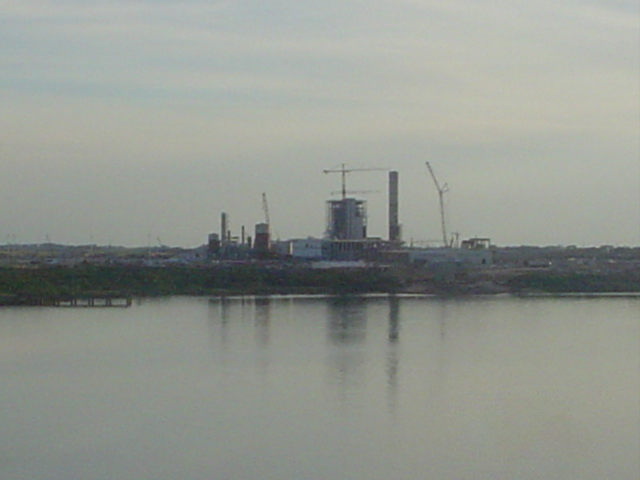 Foto de las obras en la planta productora de celulosa de la empresa botnia en Fray Bentos en Diciembre de 2006